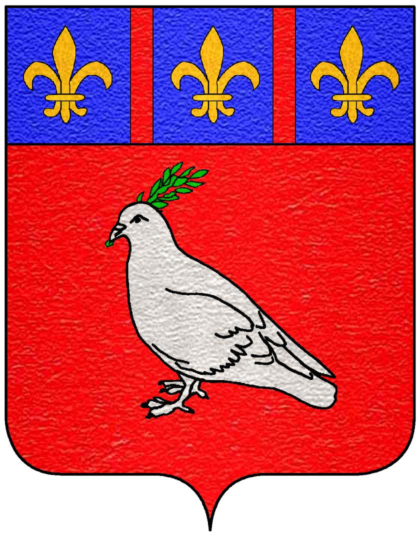 Stemma della famiglia Pamphili